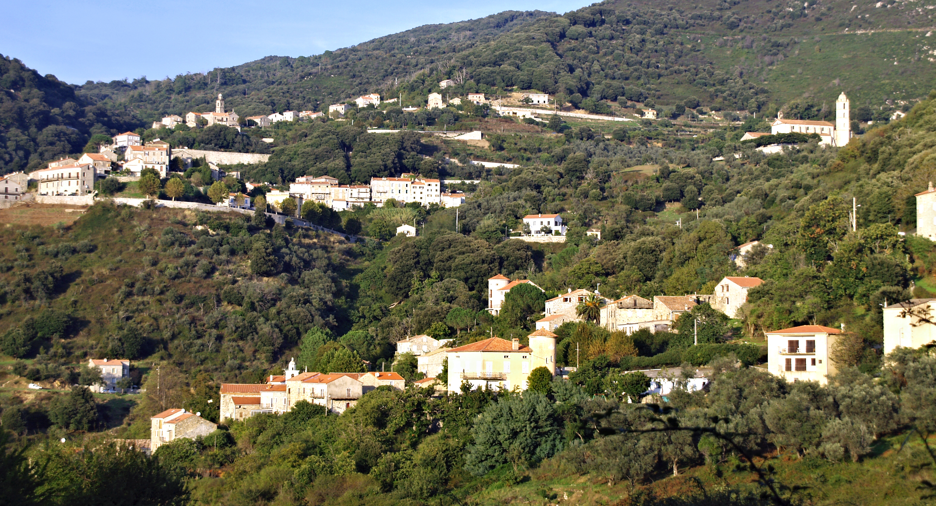 Olmiccia, Sud-ouest Corse (Corse) - Vue d'Olmiccia. À l'arrière-plan, le village de Sainte-Lucie-de-Tallano